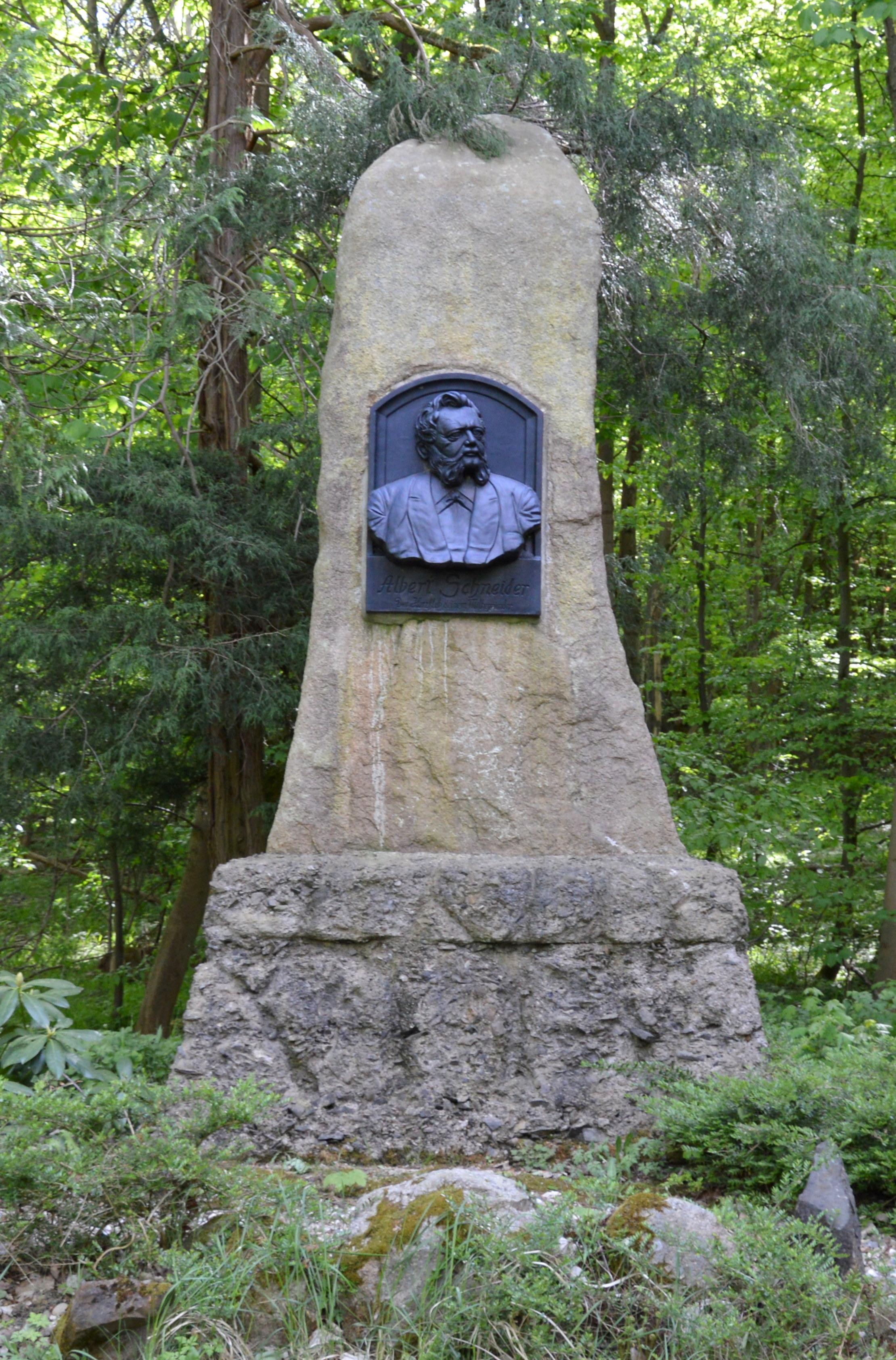 Albert Schneider Denkmal